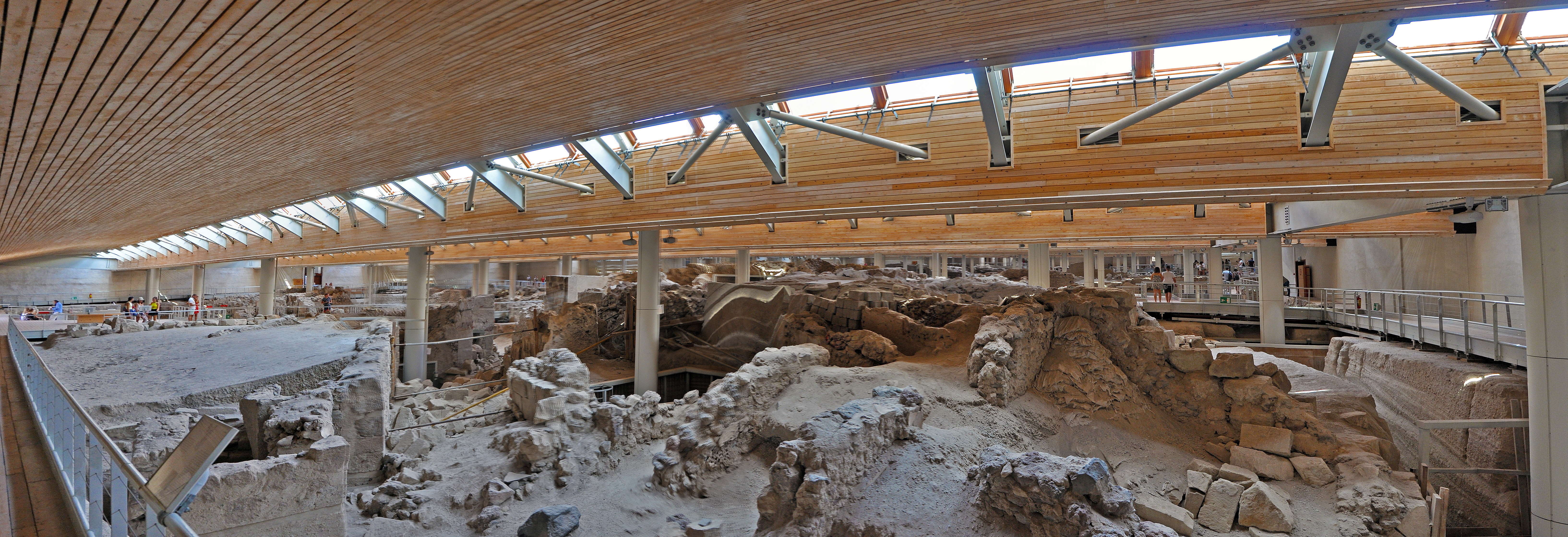 Panorama degli scavi di Akrotiri, Santorini, Grecia, agosto 2018